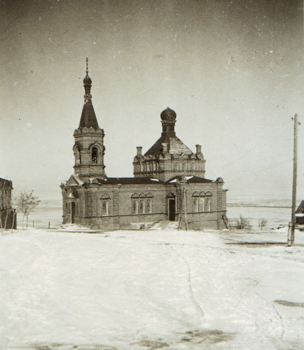 Новочеркасск в годы оккупации 1942-февраль 1943. Храм Константина и Елены.